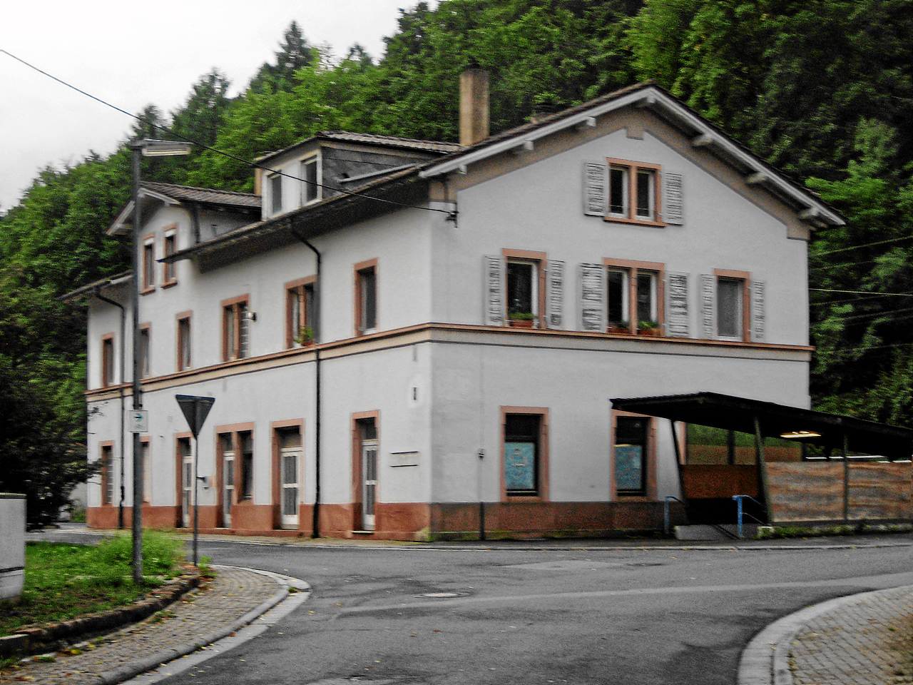 Bezeichnung: Bahnhof Lage: Bahnhofstraße 1 Ort: Weidenthal Bauzeit: 1848/49, Erweiterung 1896 Beschreibung: Bahnhof der pfälzischen Ludwigsbahn; Empfangsgebäude, spätklassizistischer Putzbau,;auf dem Bahnhofsvorplatz Wittelsbacher Gedenkstein, Eisenplatte, 1880